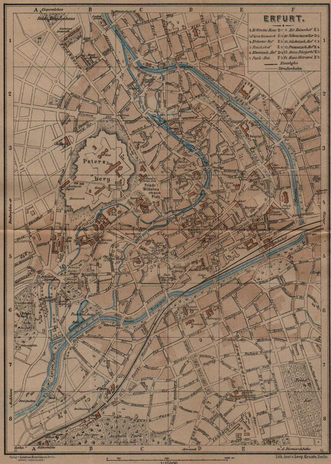 Kartenbeilage Erfurt